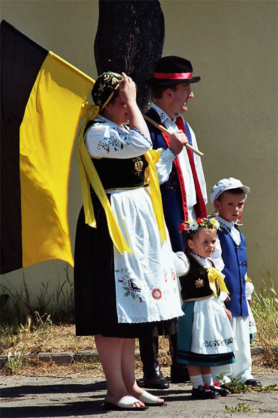 Kaszubska rodzina w strojach ludowych. Zjazd Kaszubów Łeba 2005. Kaszëbsczi: Kaszëbskô familëjô w kaszëbsczich ruchnach. Zéńdzenié Kaszëbów w Lebie w 2005 r.